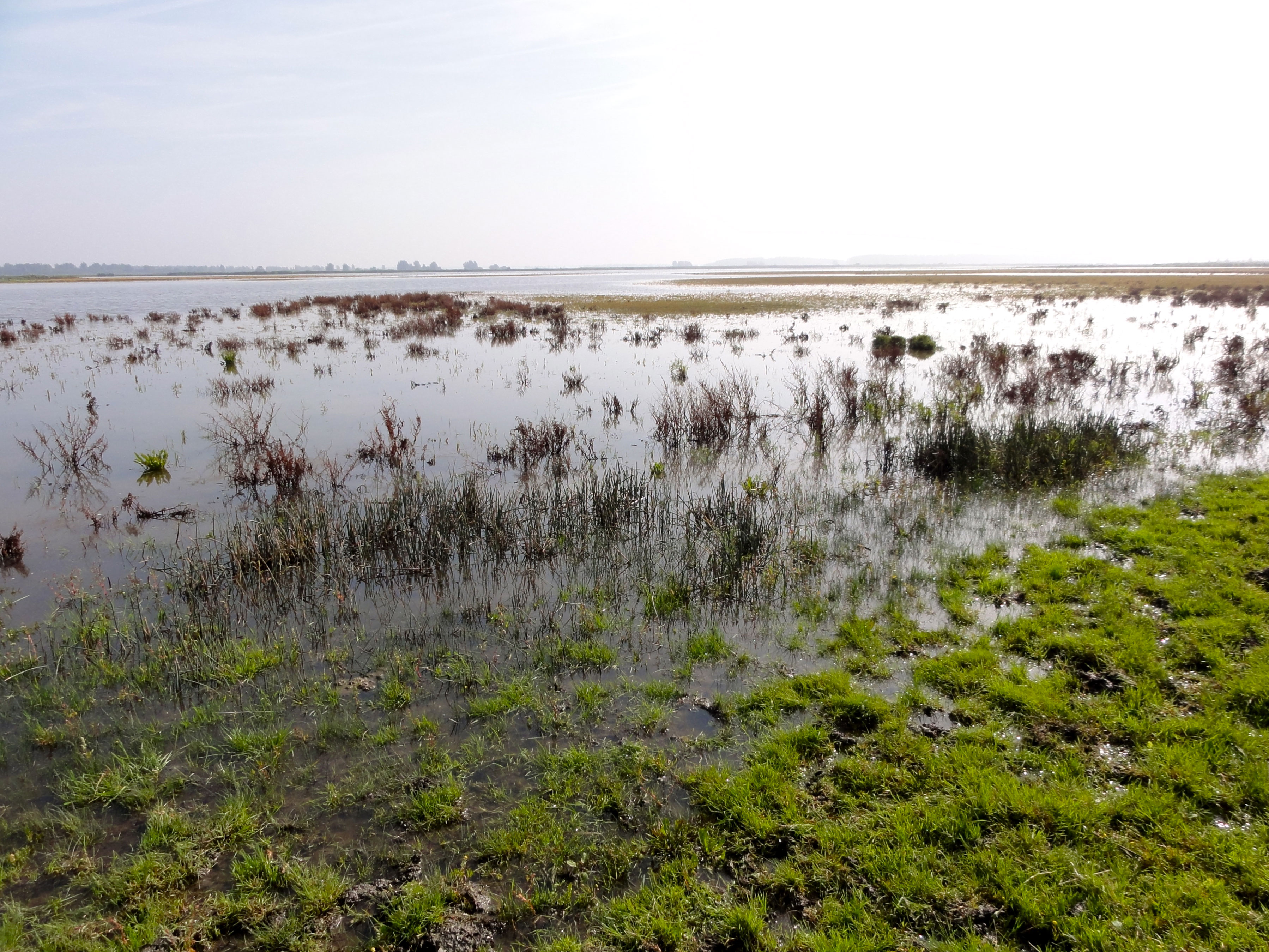 Nationaal park Lauwersmeer